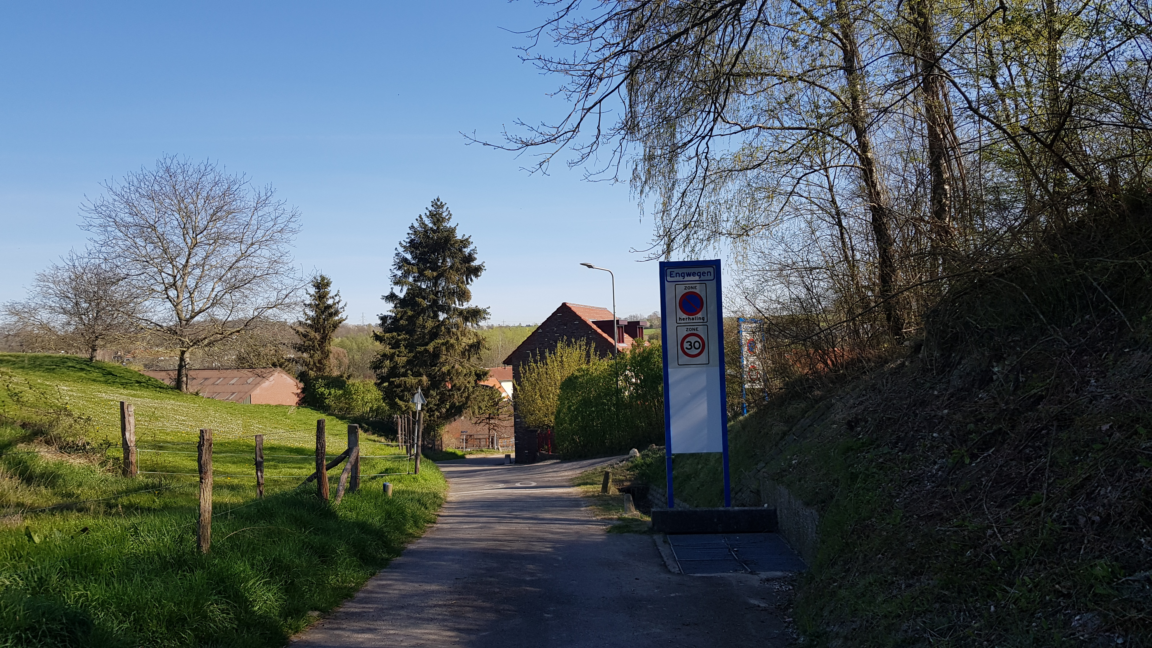 kombord Engwegen, Schin op Geul, Nederland